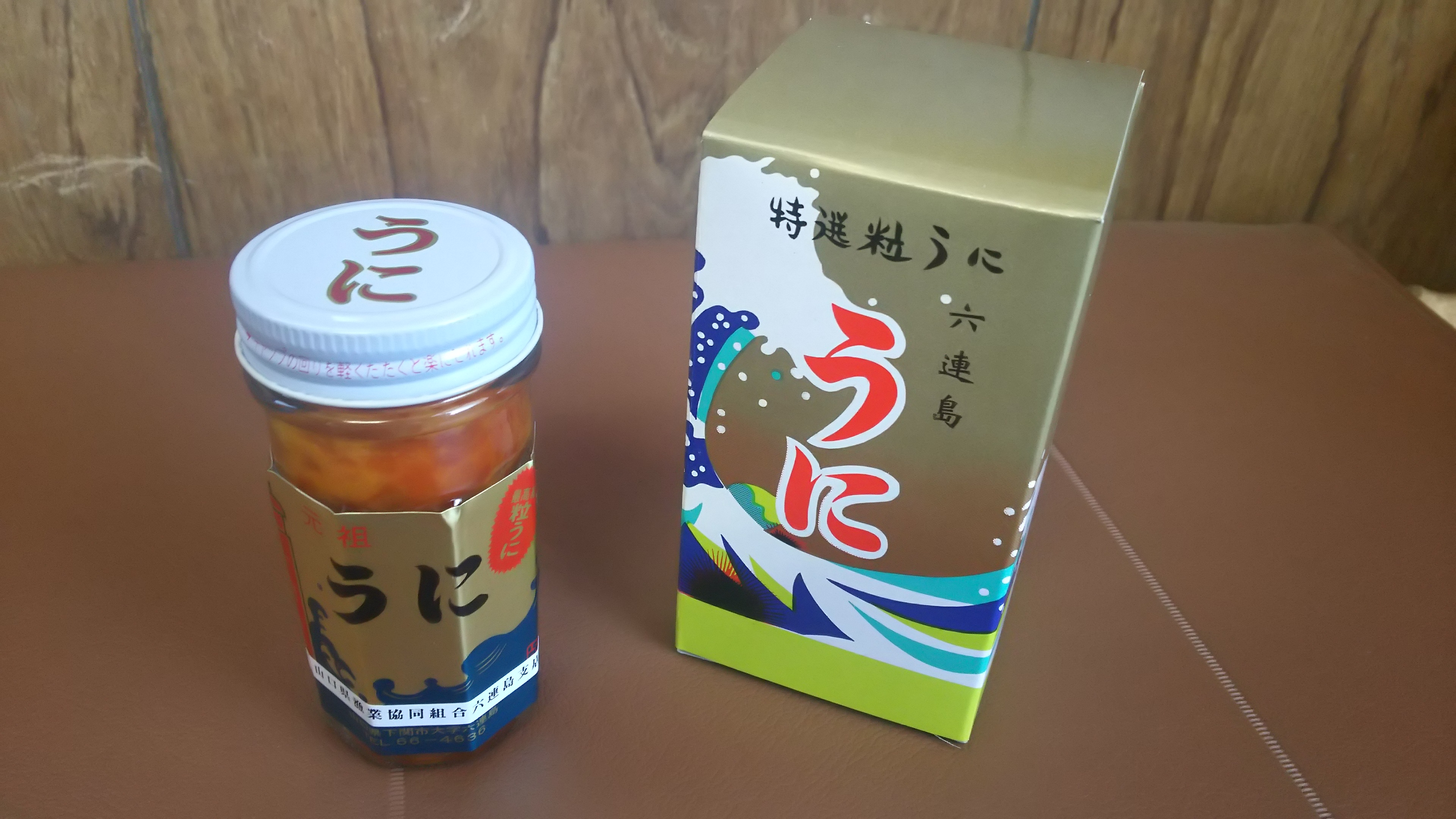 六連島にて生産されているアルコールうにの瓶詰め